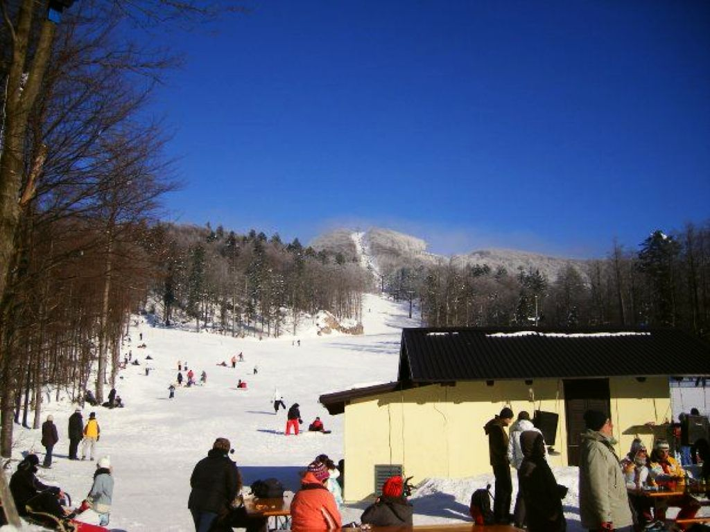 Ski centar Platak, Rijeka